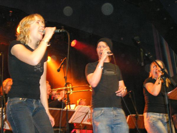 SOF 2005